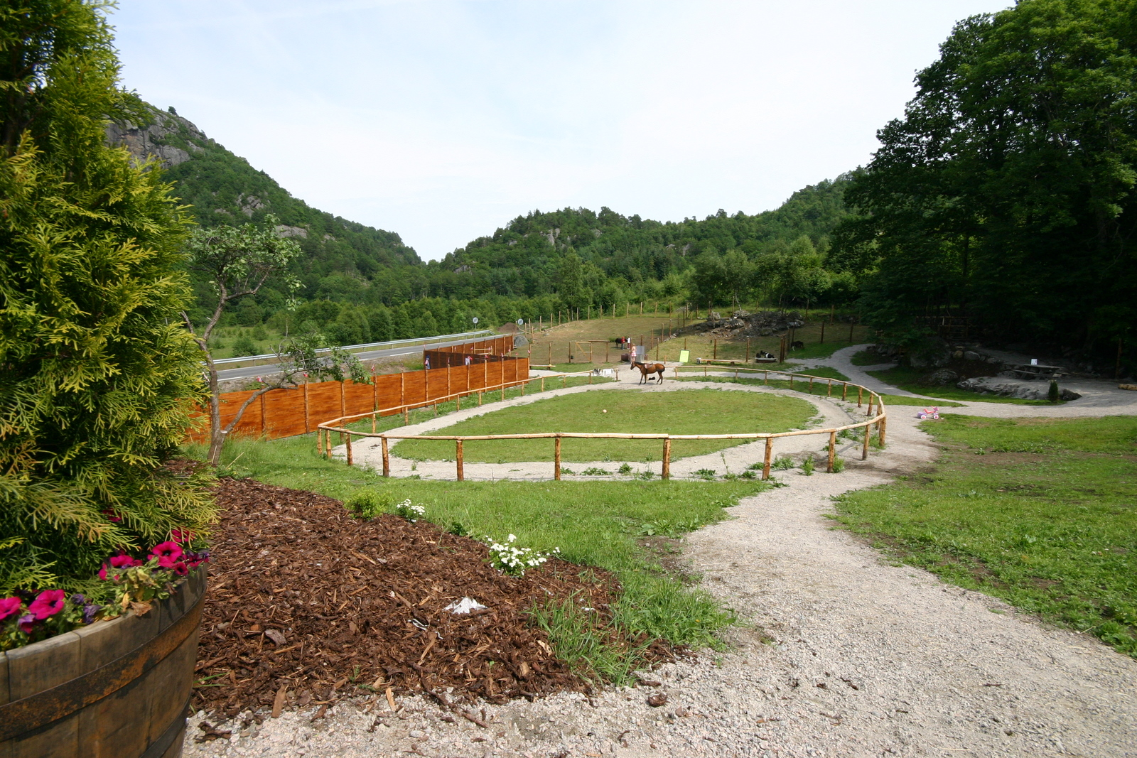 Barnas dyrepark, Svennevik, Lindesnes kommune i Vest-Agder.